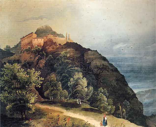 Le fotografie pittura dell'artista Alberto Pasini creato nel 1848.